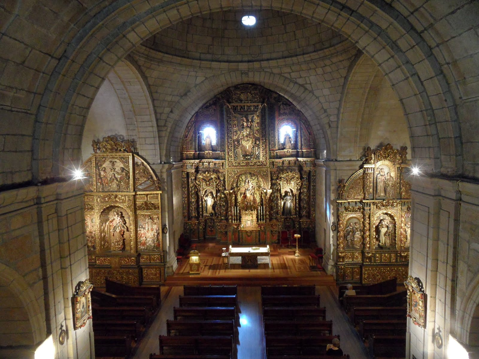 Interior de gran armonía y equilibrio. La planta es de cruz latina y mide 34 metros de largo por 19 de ancho en el crucero y 9,50 en la nave, con 11 metros de altura.